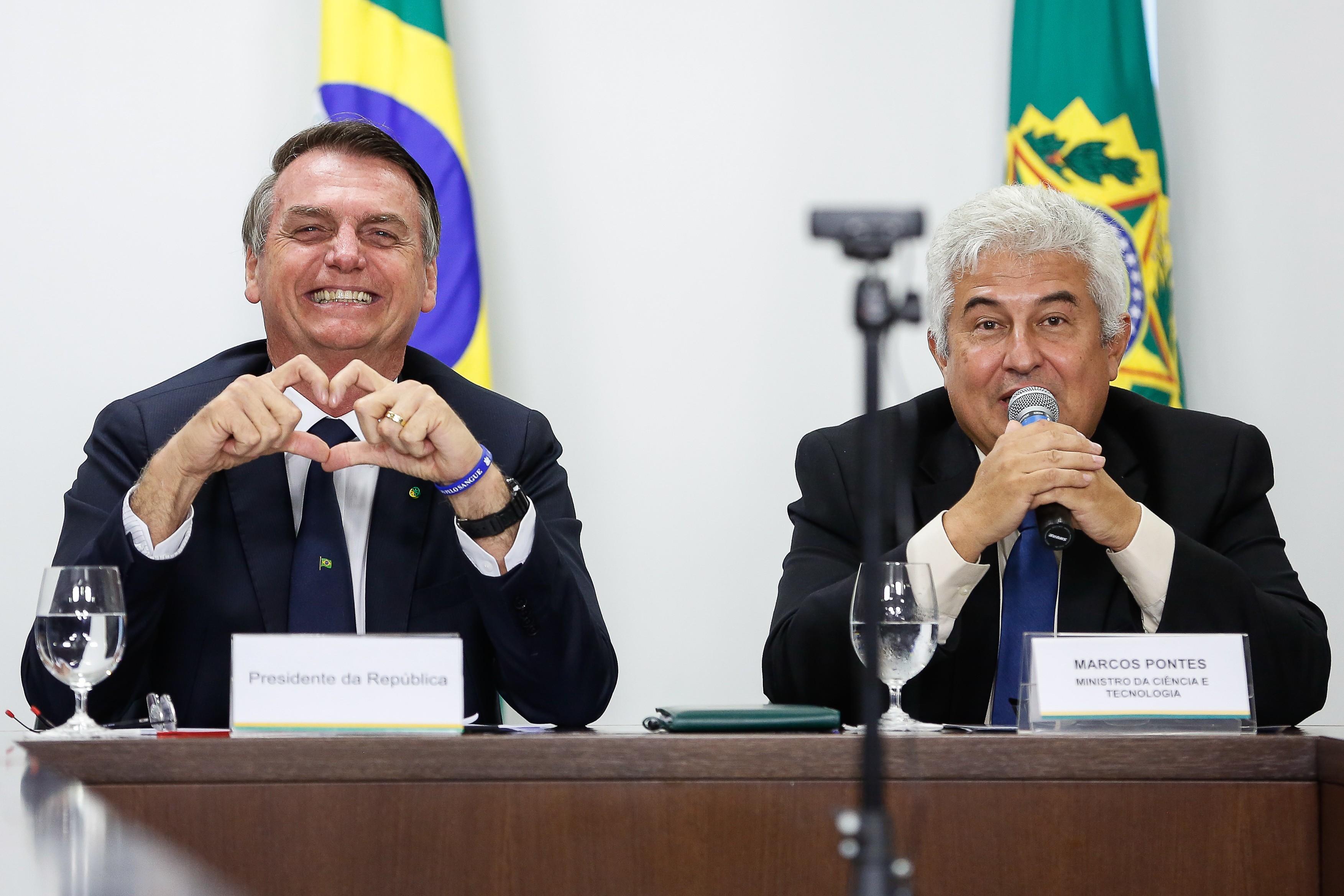 (Brasília - DF, 08/05/2019) Reunião com o Ministro da Educação Abraham Weintraub e o Ministro da Ciência, Tecnologia, Inovações e Comunicações Marcos Pontes. Foto: Carolina Antunes/PR